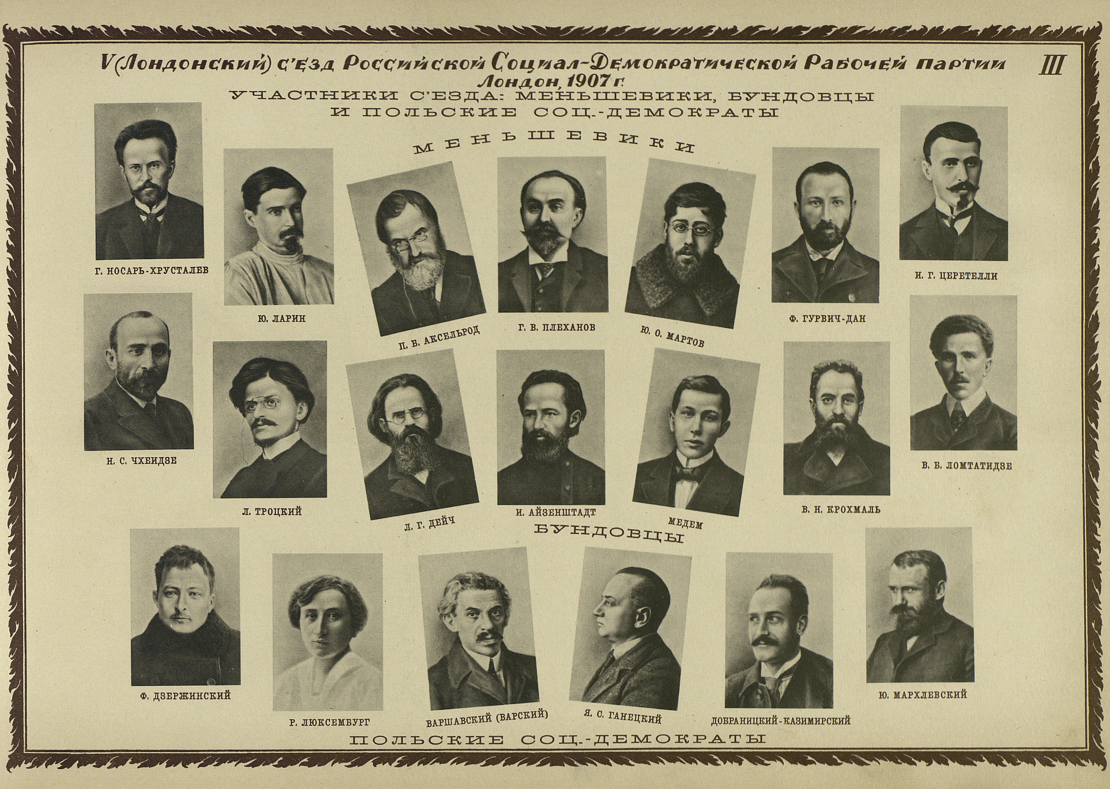 делегаты съезда